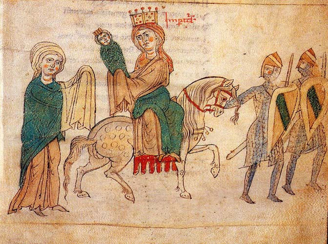 Konstancie Sicilská